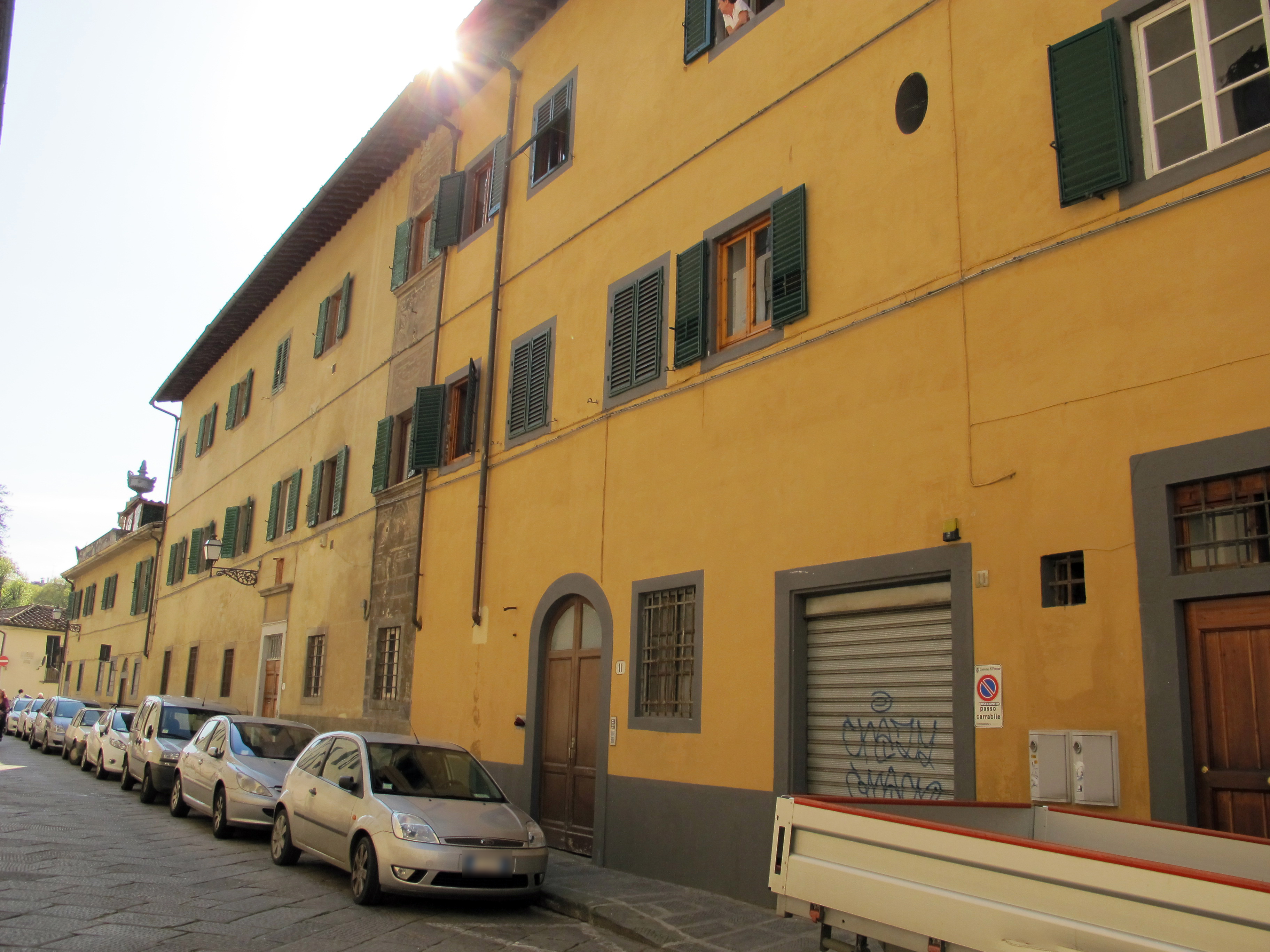 Via delle casine 9-11, ex- convento delle fanciulle del ceppo